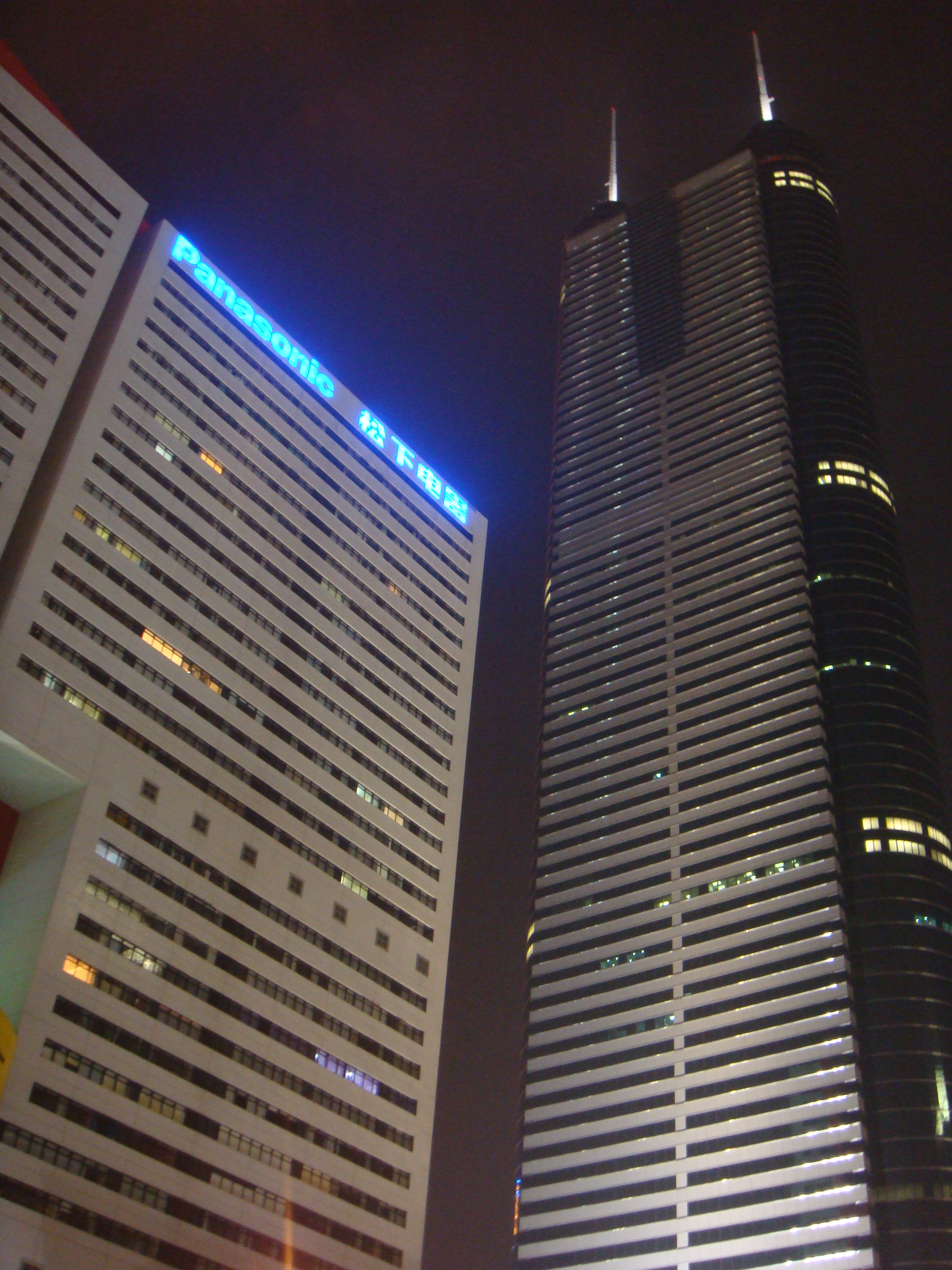 信興廣場